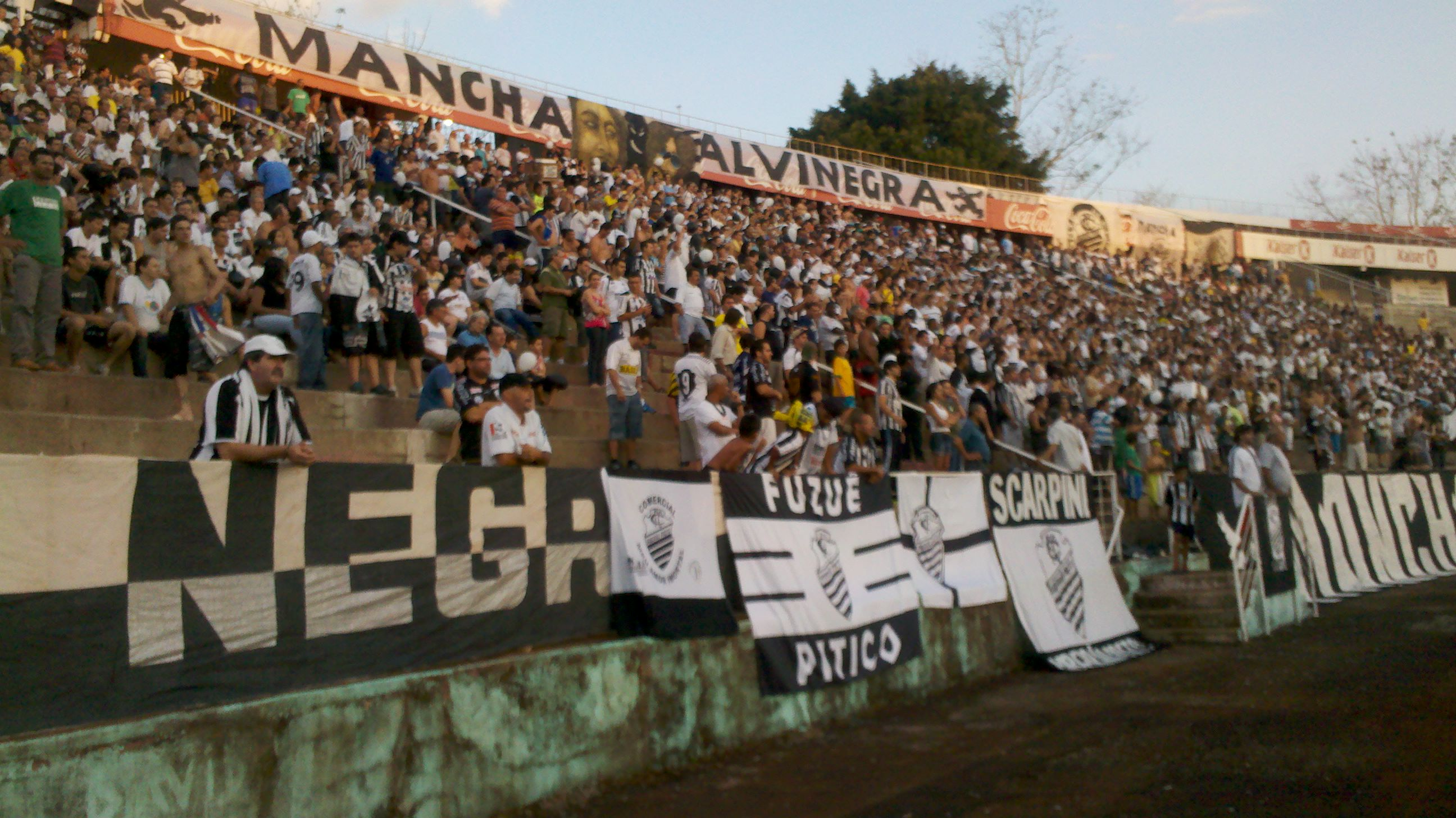 Torcida do Comercial na final da Copa Paulista 2011